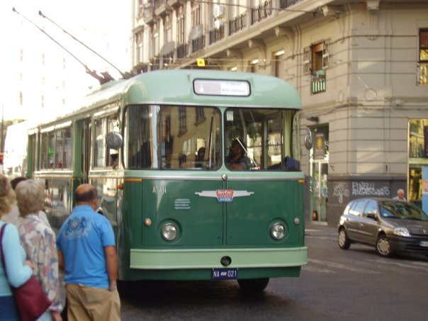 Filobus Storico ANM Alfa 1000 "8021" in fermata al corso Garibaldi come navetta Napoli-Museo di Pietrarsa, in occasione dei 170 anni dall'apertura della ferrovia Napoli-Portici, prima ferrovia italiana.